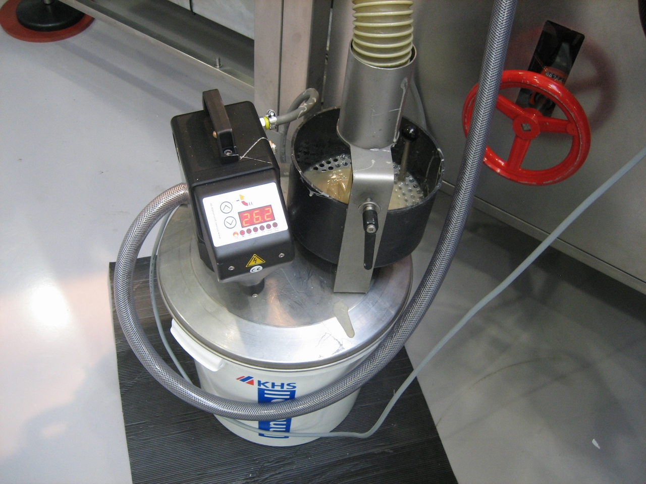 Leimeimer mit eingesteckter Leimpumpe. Linke Seite die Leimeinsteckpumpe mit pneumatischem Antrieb und integrierter Heizung, rechts der Rücklauf des nicht benötigten Leims.